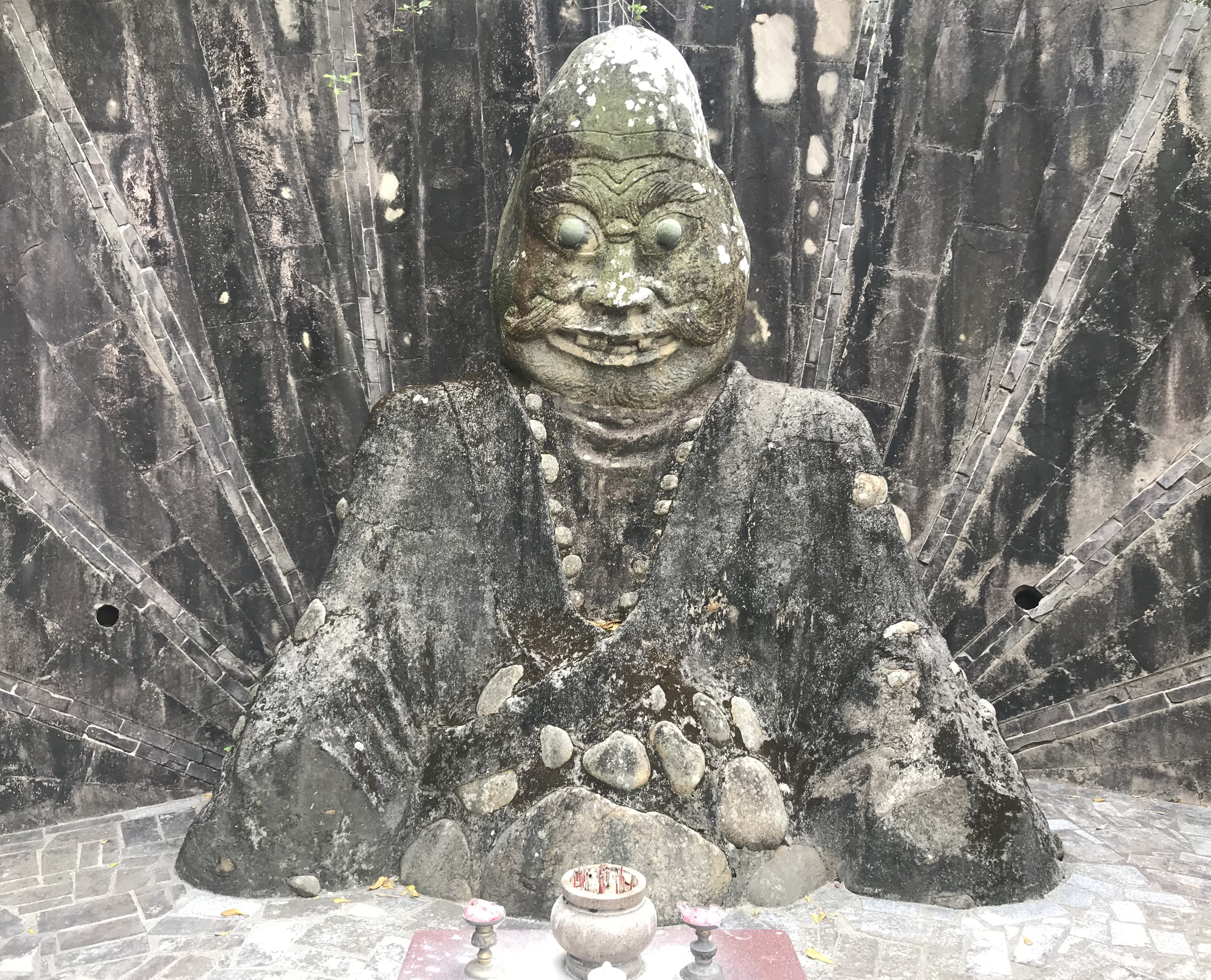 外埔不倒翁近景